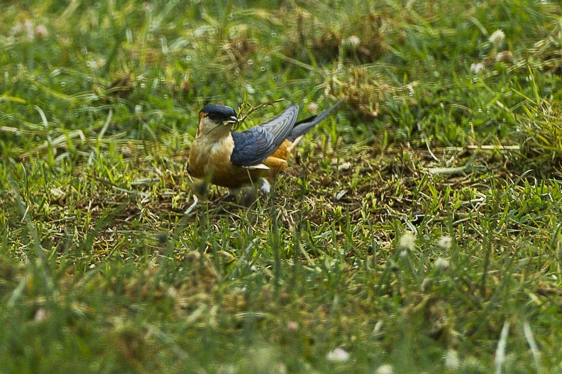 Mosque Swallow - Kenya_S4E7459